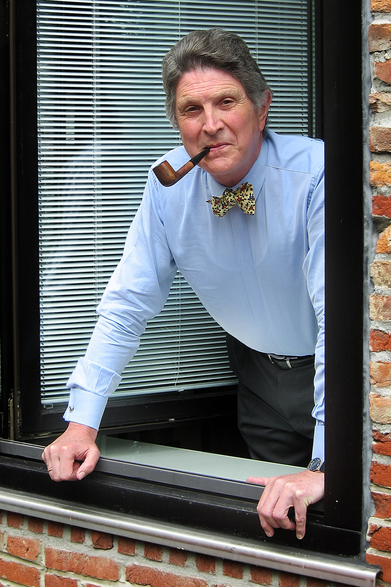 Philippe Samyn